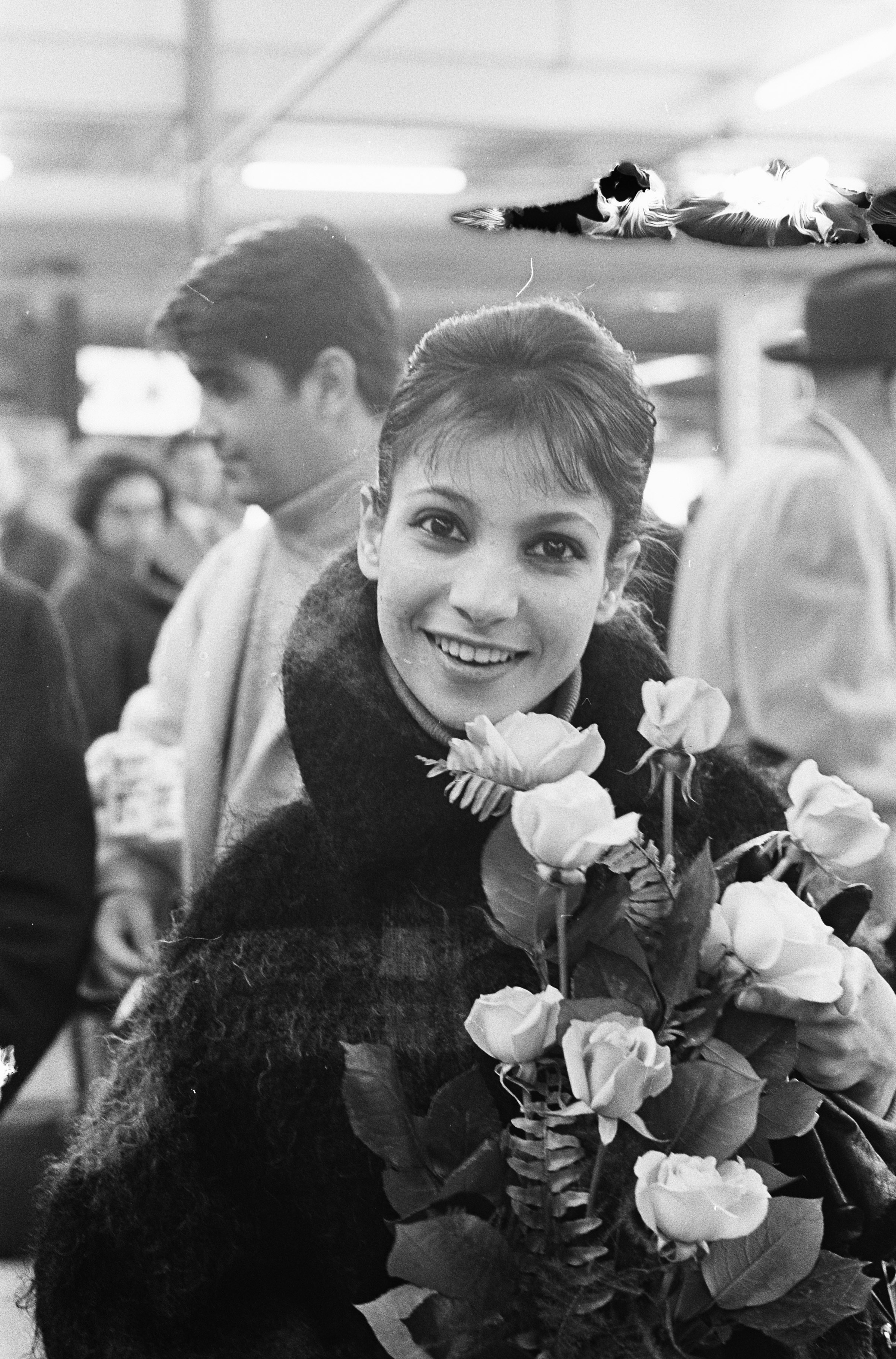 Collectie / Archief : Fotocollectie Anefo Reportage / Serie : [ onbekend ] Beschrijving : Esther Ofarim (zangeres) in Nederland voor optreden Grand Gala du Disque Datum : 10 oktober 1963 Trefwoorden : Optredens, zangeressen Persoonsnaam : Esther Ofarim Fotograaf : Pot, Harry / Anefo Auteursrechthebbende : Nationaal Archief Materiaalsoort : Negatief (zwart/wit) Nummer archiefinventaris : bekijk toegang 2.24.01.05 Bestanddeelnummer : 915-6192